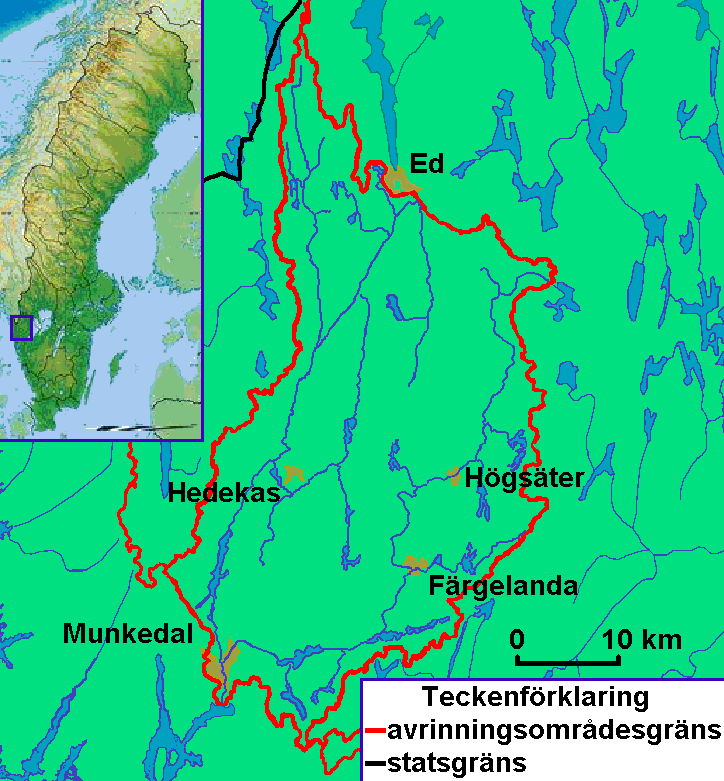 Карта річки Еречілсельвен на півдні Швеції у лені Вестра-Йоталанд шведською мовою. Для створення карти використано карту File:Map of the river Örekilsälven – UK – Карта річки Еречілсельвен.gif.